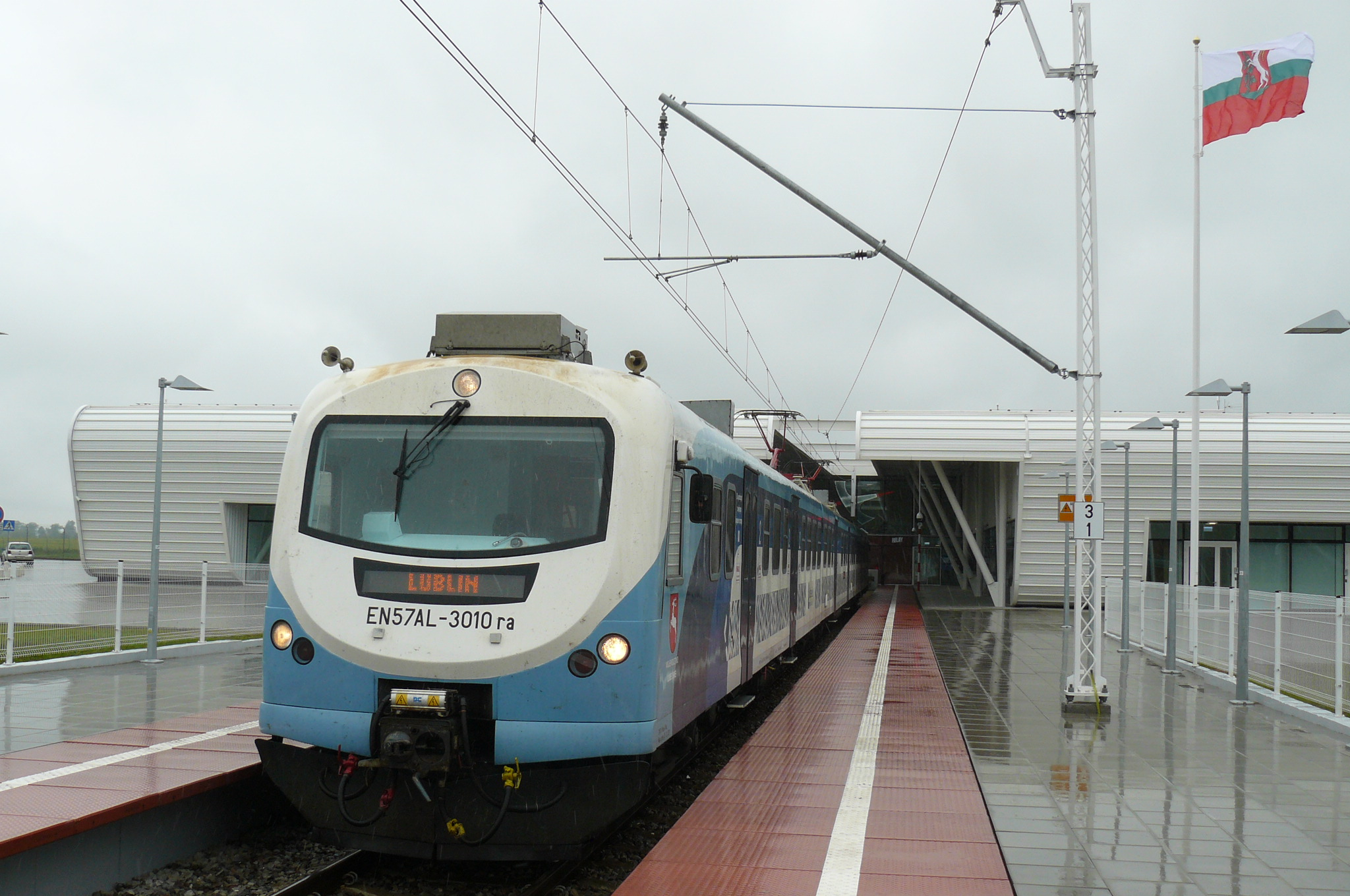 EN57AL-3010 jako pociąg z Lublina do Świdnika Portu Lotniczego.